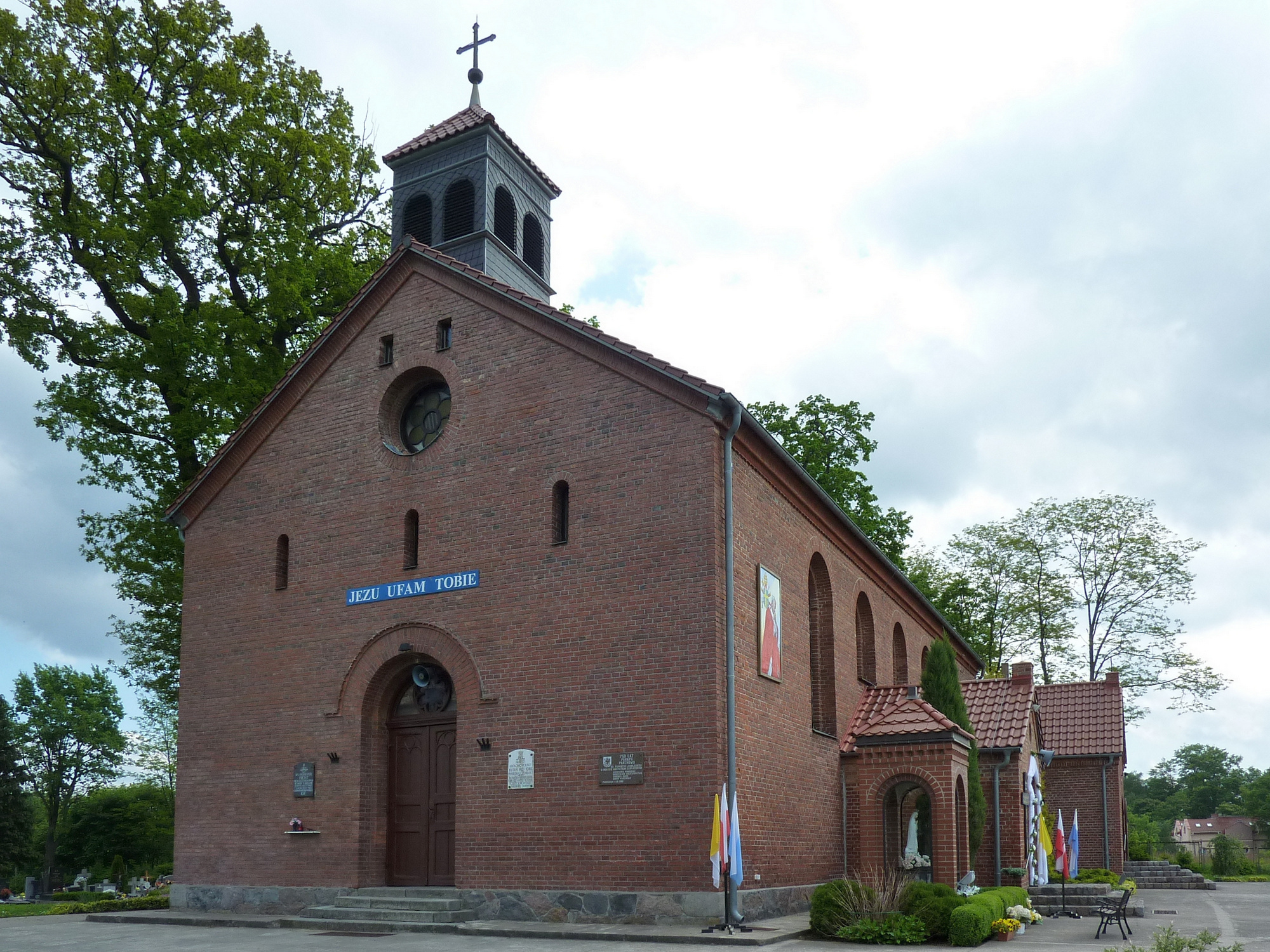 Parchowo - kościół parafialny pw. św. Mikołaja (zabytek nr 1749).